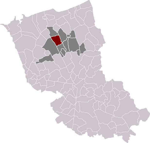 Locatie gemeente Stene in arrondissement Duinkerke. Zelfgemaakt. Location of Steene municipality in the arrondissement of Dunkirk. Self made. Localisation de la commune de Steene dans l'arrondissement de Dunkerque. Fait moi-même.